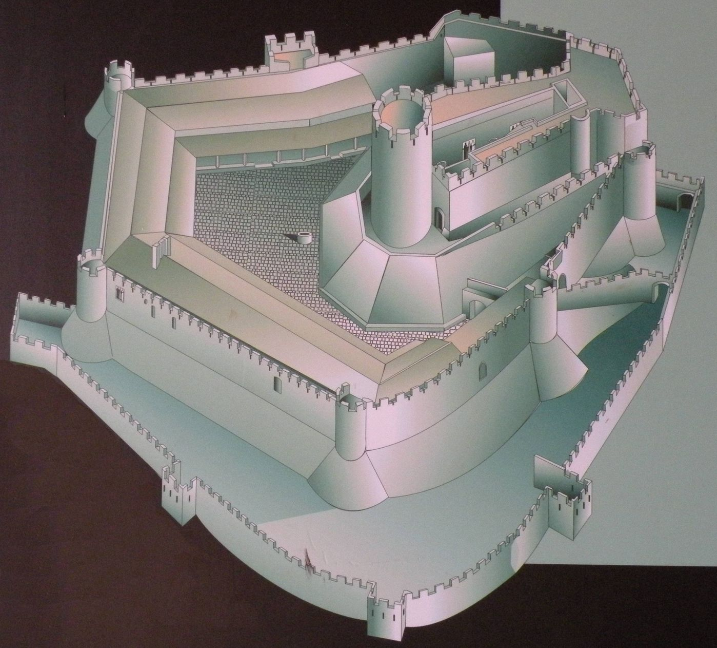 Esquema del castell de Montsoriu, fotografia de l'esquema present a l'exposició a la sala del menjador del castell